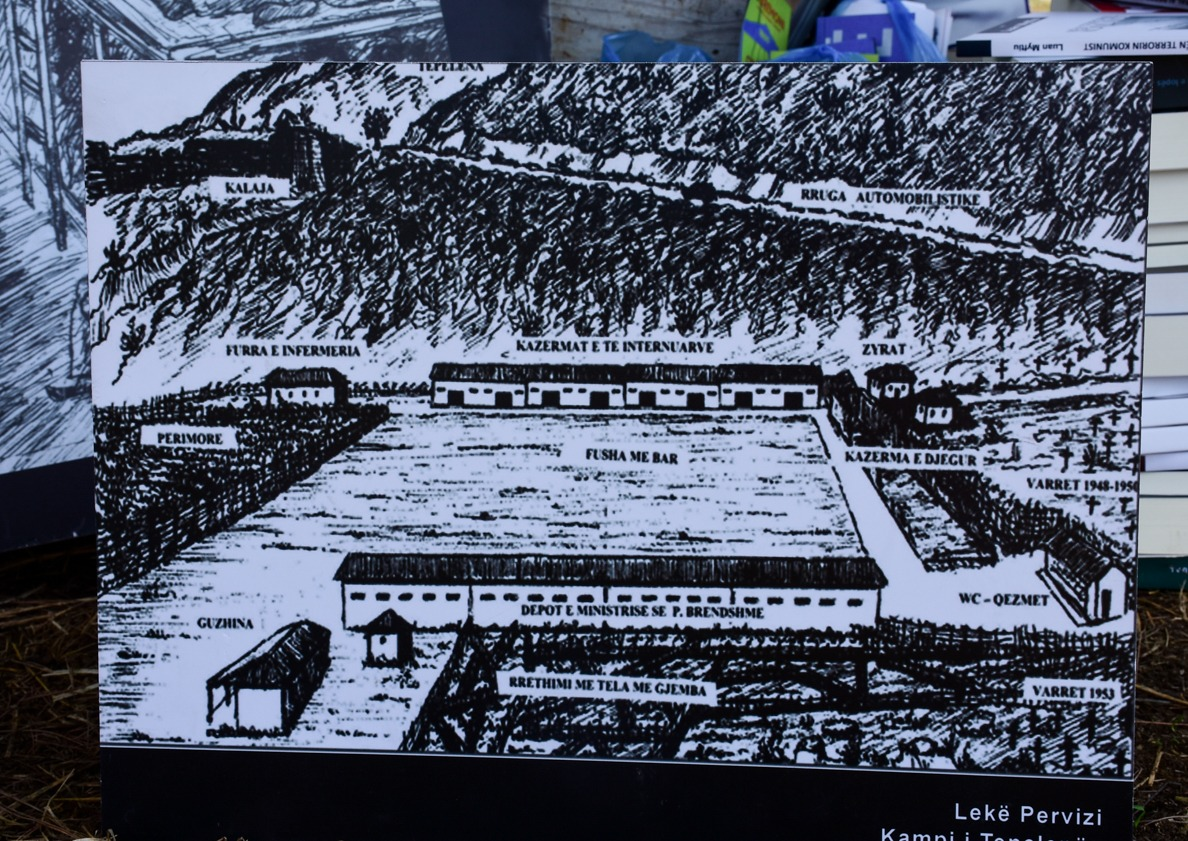 Planimetria e kampit të Tepelenës vizatuar nga ish i burgosuri Lekë Pervizi Foto nga Loreta Cuka